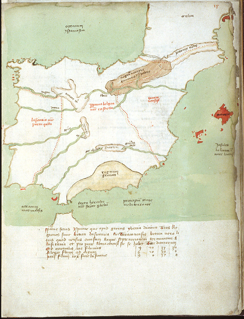 Mapa de la península Ibérica en un atlas manuscrito anónimo del siglo XV, escrito en latín (Harley MS 3686 de la British Library). Tiene la particularidad de mostrar las fronteras entre los reinos ibéricos: Portugal, Castilla, Aragón, Navarra y, de un color diferente, el reino musulmán de Granada y Navarra.